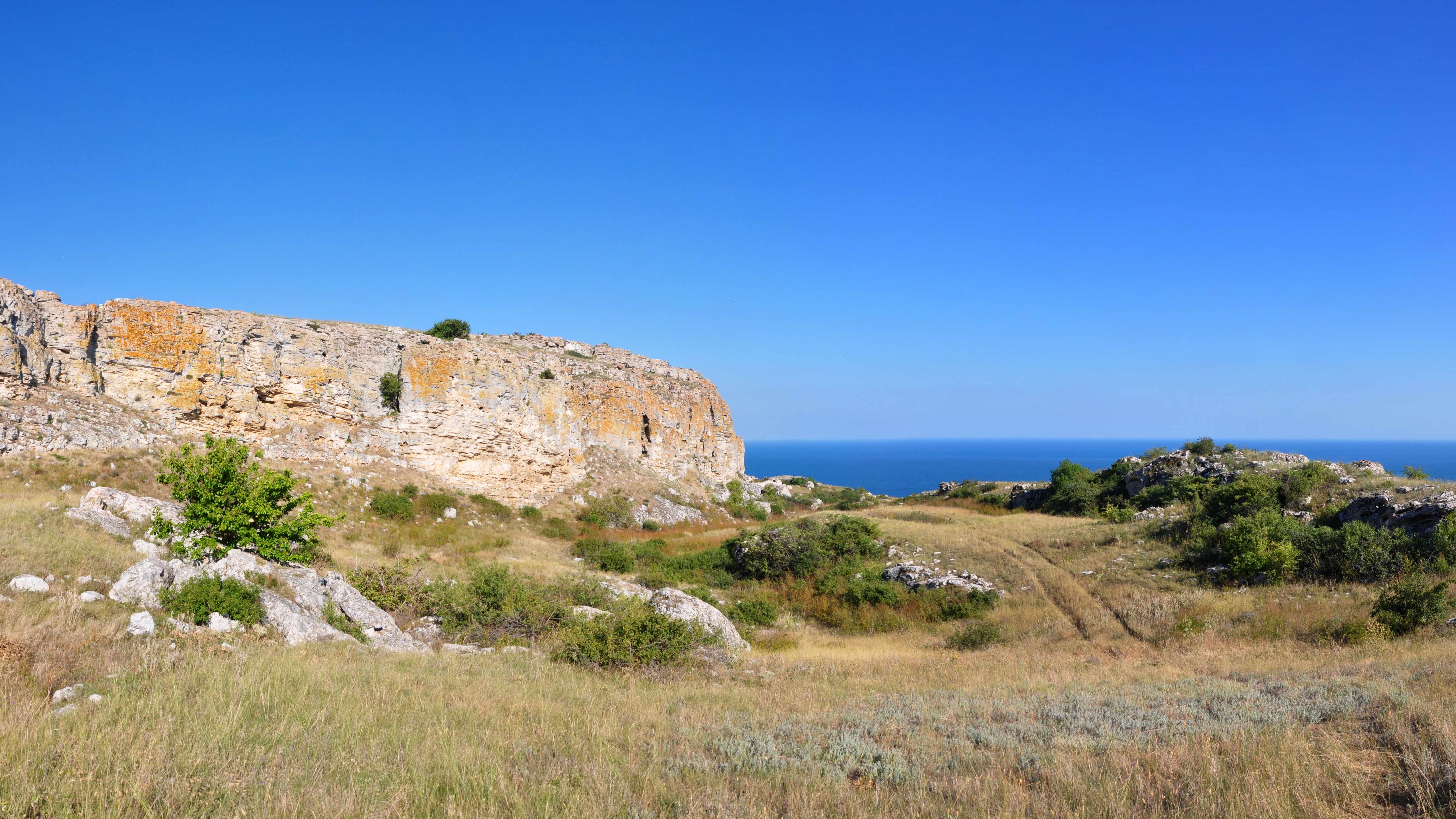 Опукський природний заповідник